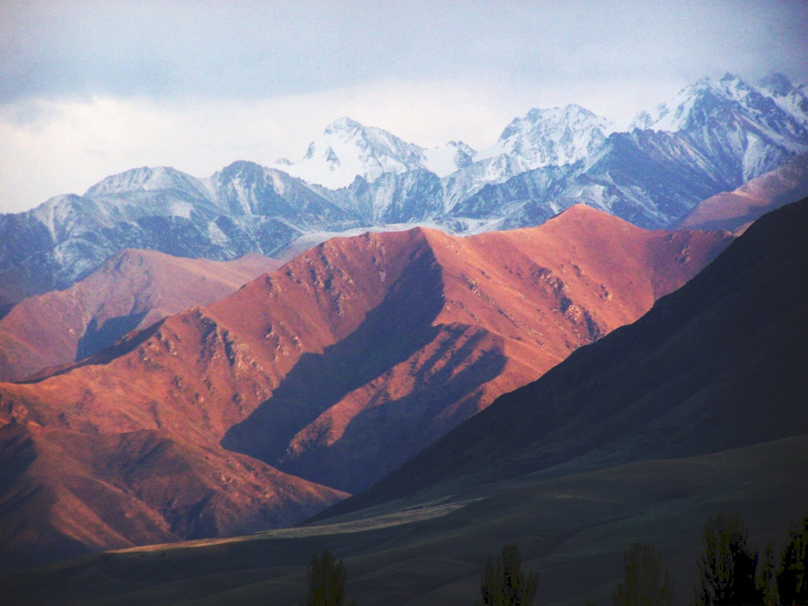 Kyrgyzstan Alatau Mountains